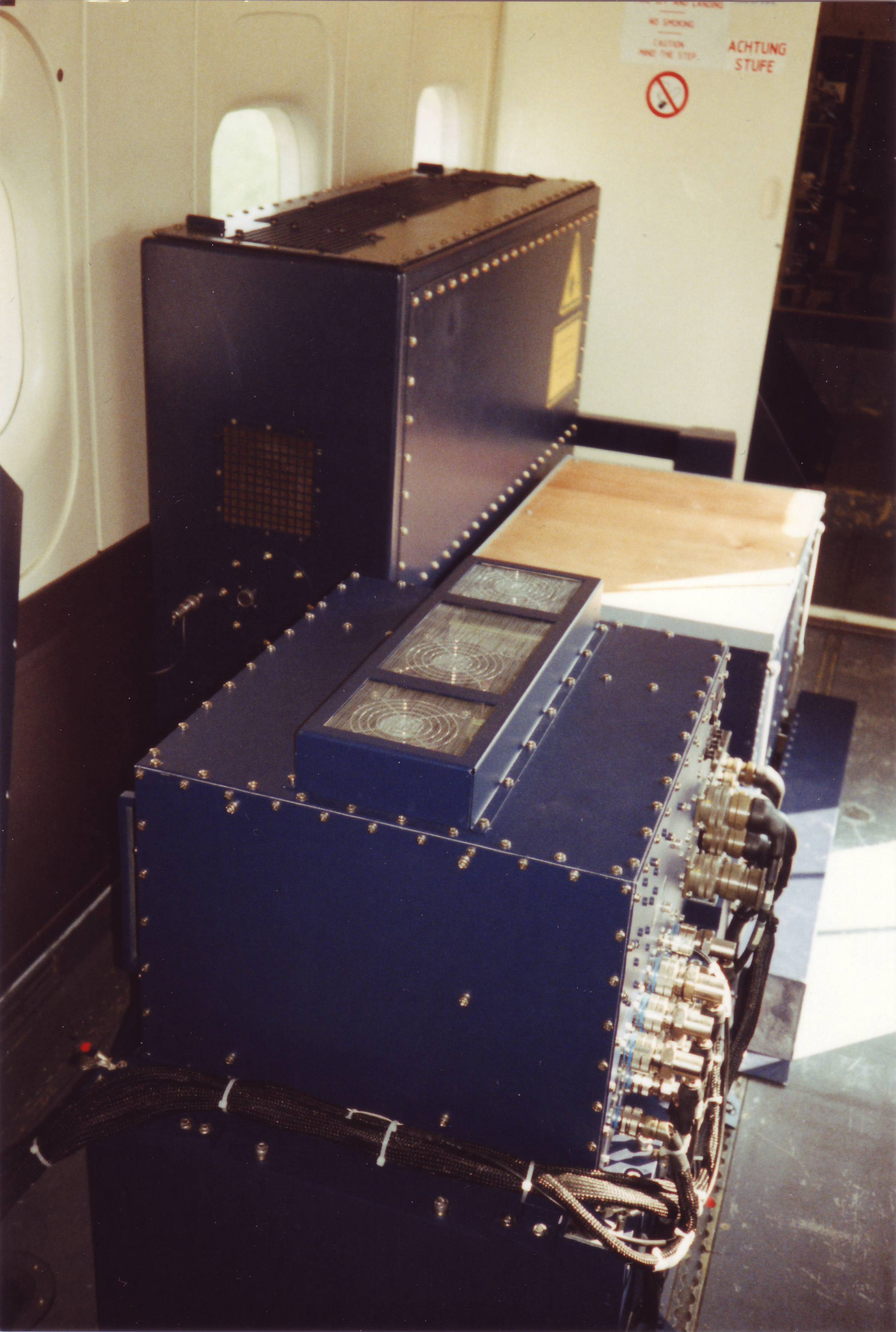 Microwellen-Radiometer und Laser Fluor sensor in Oelüberwachungsflugzeug Dornier Do 228 LM; Scan eines Bildes aus dem Jahr 1993